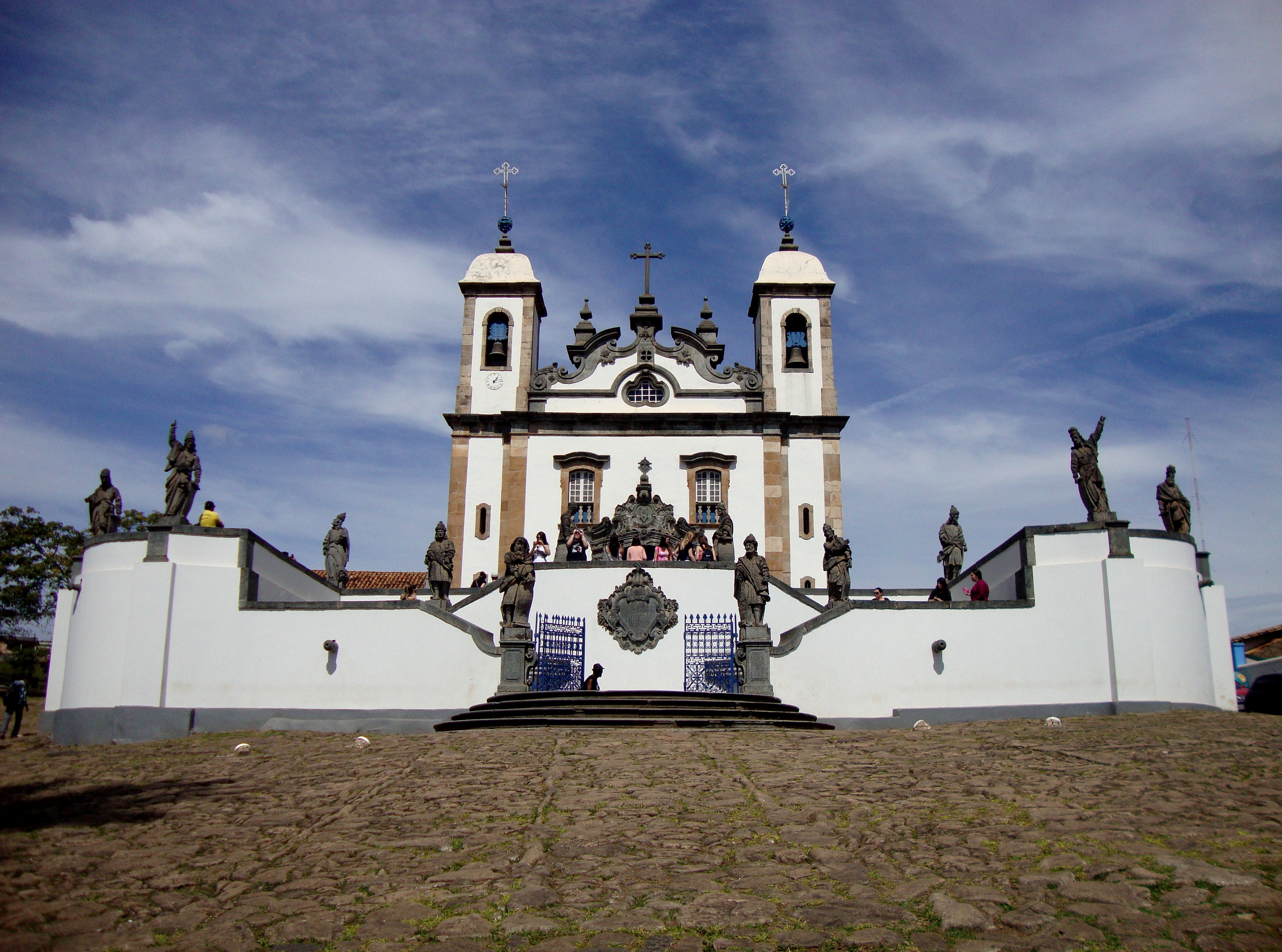 Santuário de Bom Jesus de Matozinhos: conjunto arquitetônico, paisagístico e escultórico